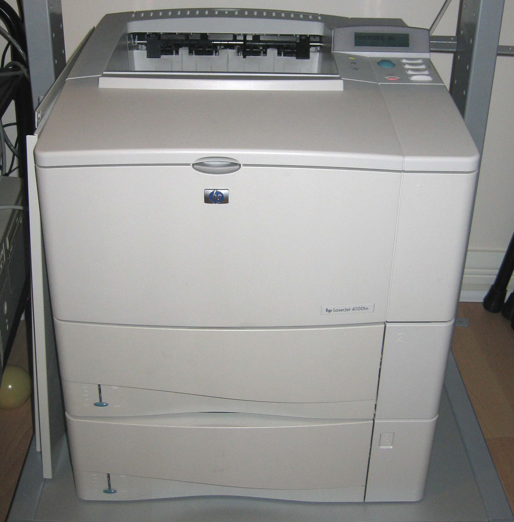 Hewlett Packard LaserJet 4100tn